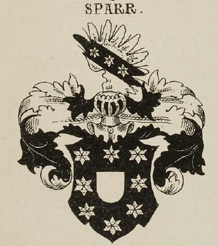 Wappen der von Sparr in Mülverstedt-Siebmacher (1880: Tafel 53), Beschreibung S. 88. (